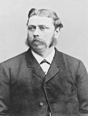 Carl Gustaf Piehl, ölbryggare och ägare till C G Piehls Bryggeri